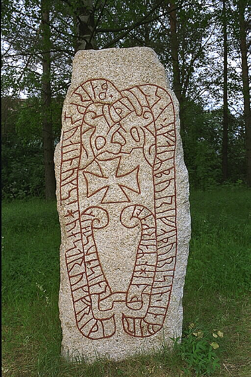 RAÄ-nummer Njurunda 116:1. Inskriften lyder: Bergsven och Sigfast och Fride reste denna sten efter Bure, sin fader. Och Fardägn ristade.